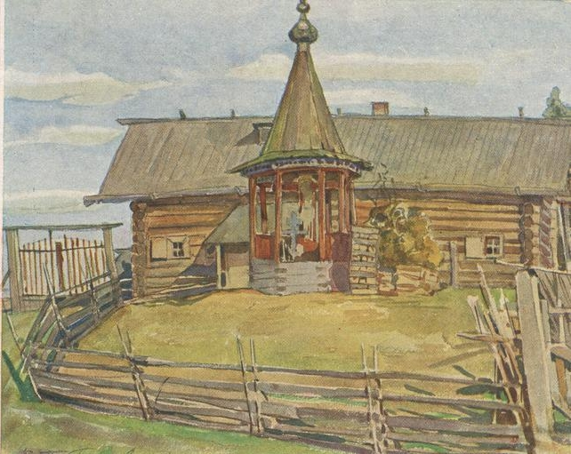 Дом Большака. Выговская пустынь Олонецкой губернии. Открытка Общества возрождения художественной Руси.